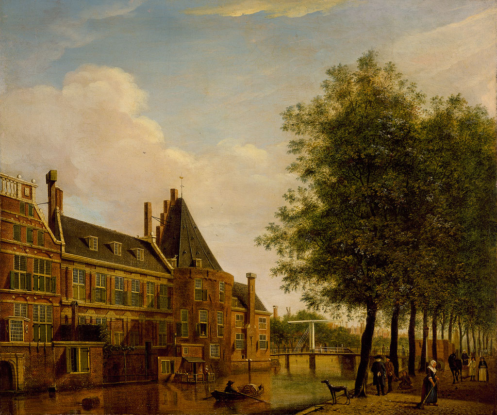 schilderij; stadsgezicht; stadsgezicht Amsterdam; Kloveniersburgwal; Kloveniersdoelen; Swijgh Utrecht